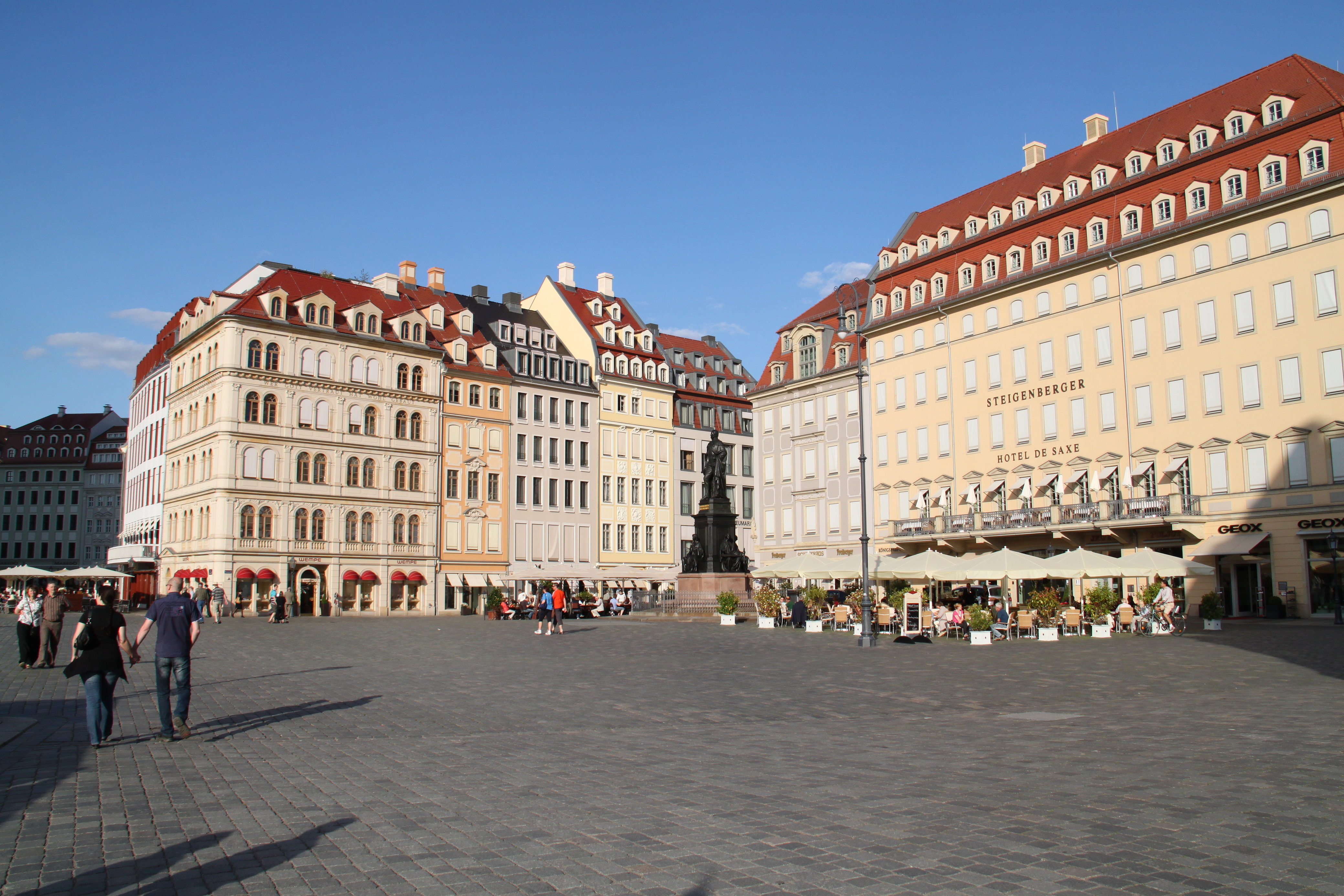 Impressionen Dresden